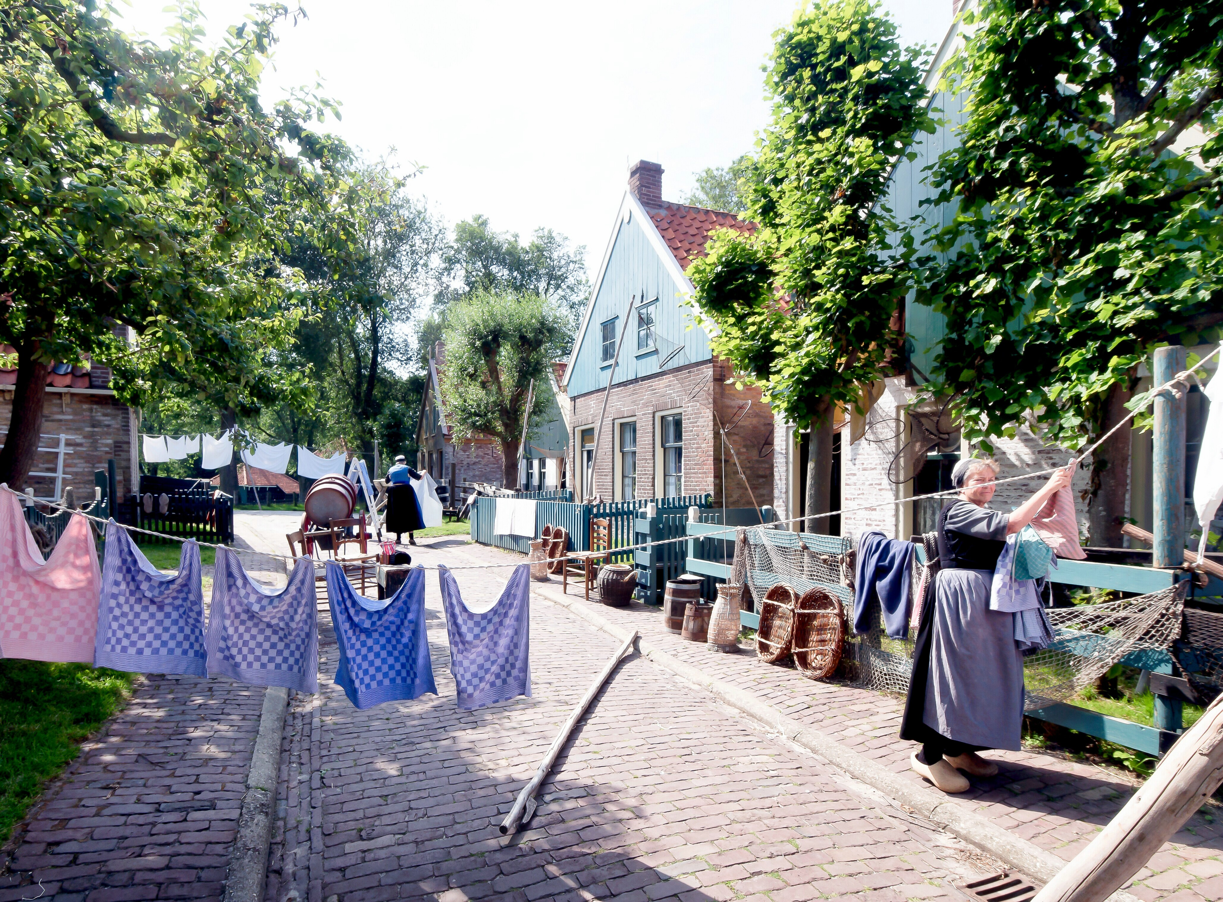 Zuiderzeemuseum